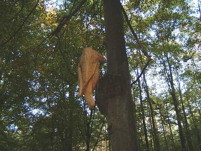 Skulptur nach Entwürfen von F. K. Waechter, zu sehen im Frankfurter Stadtwald entlang des Grüngürtels, hier der Monsterspecht an der Kreuzung Oberschweinstiegschneise / Hainerweg